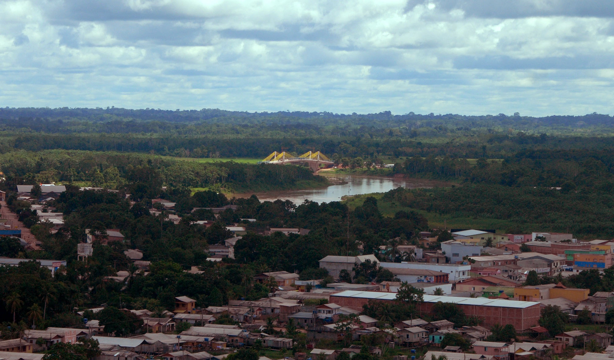 Aerial Tarauacá.